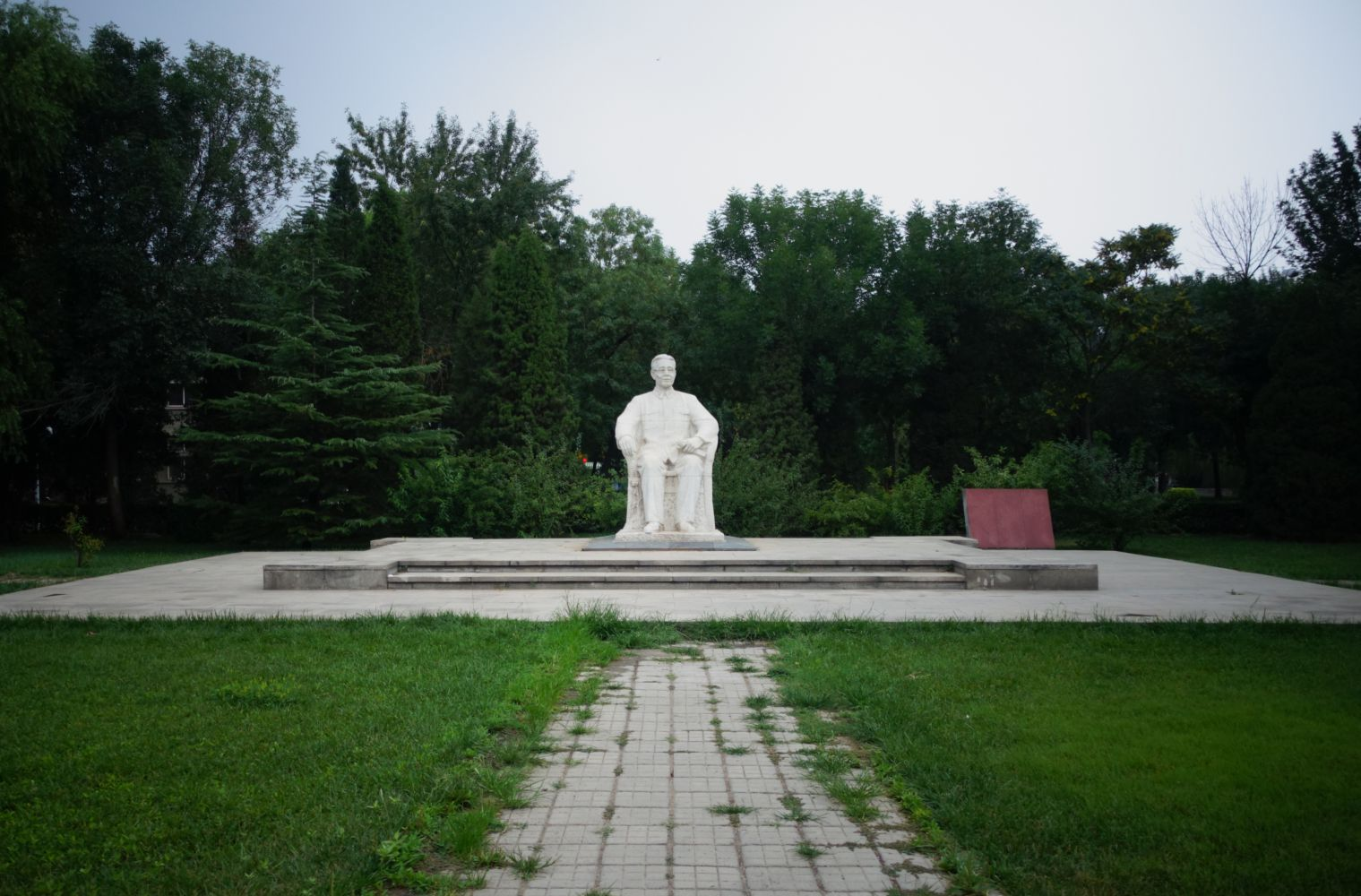 中文（中国大陆）: 南开大学杨石先校长像